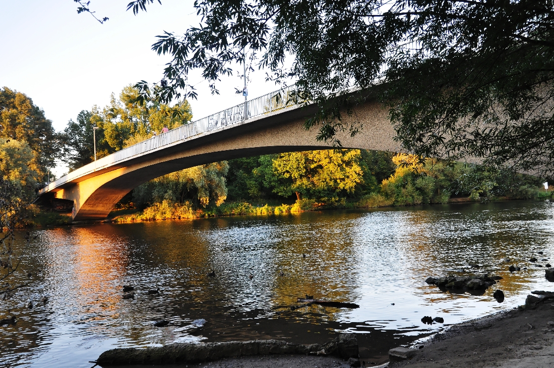 Bilder aus Linden Nord 2014